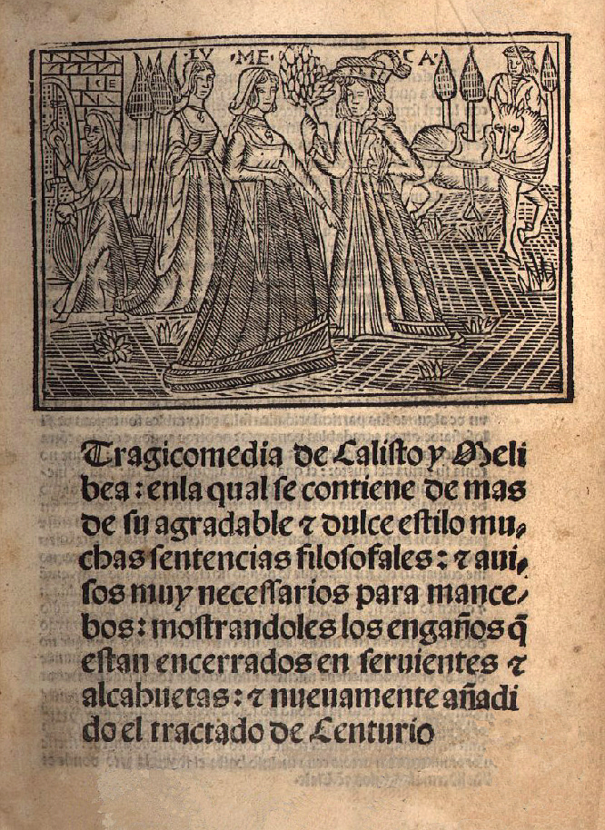 "Tragicomedia de Calisto y Melibea"; incluye algunos elementos nuevos y el tratado de Centurio.